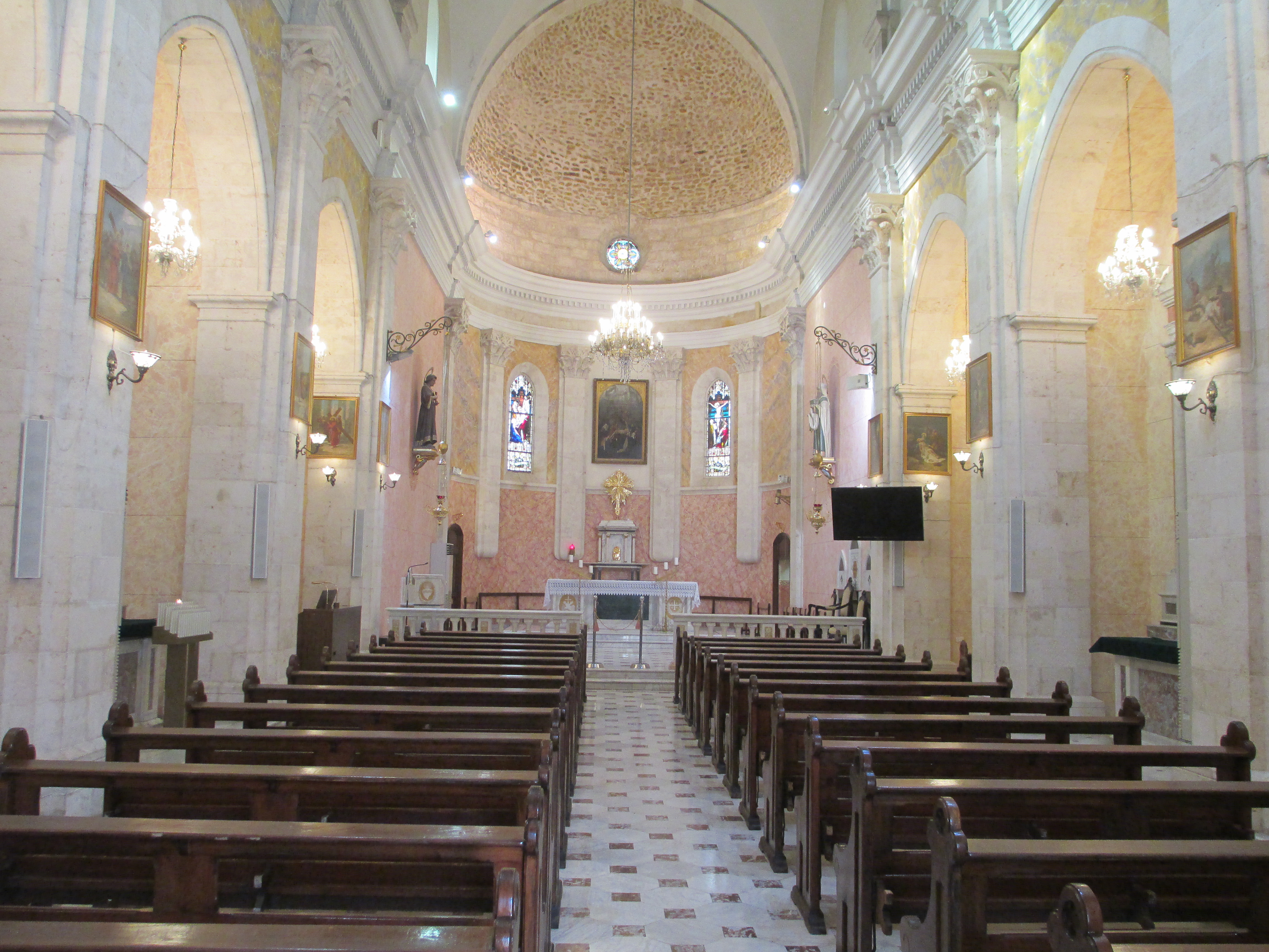 הכנסייה הפרנציסקנית ברמלה